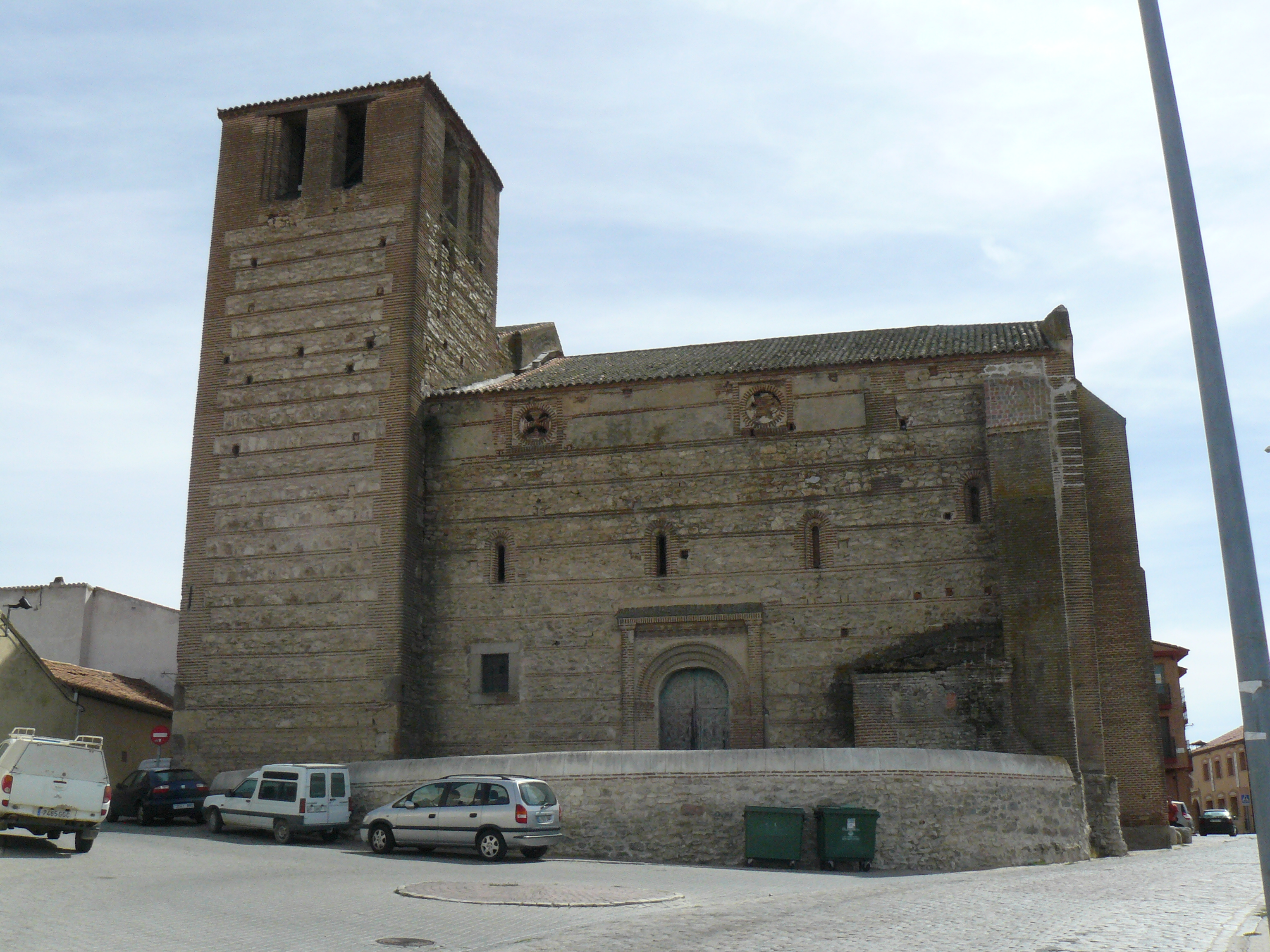 Iglesia de San Miguel, Arévalo, provincia de Ávila.